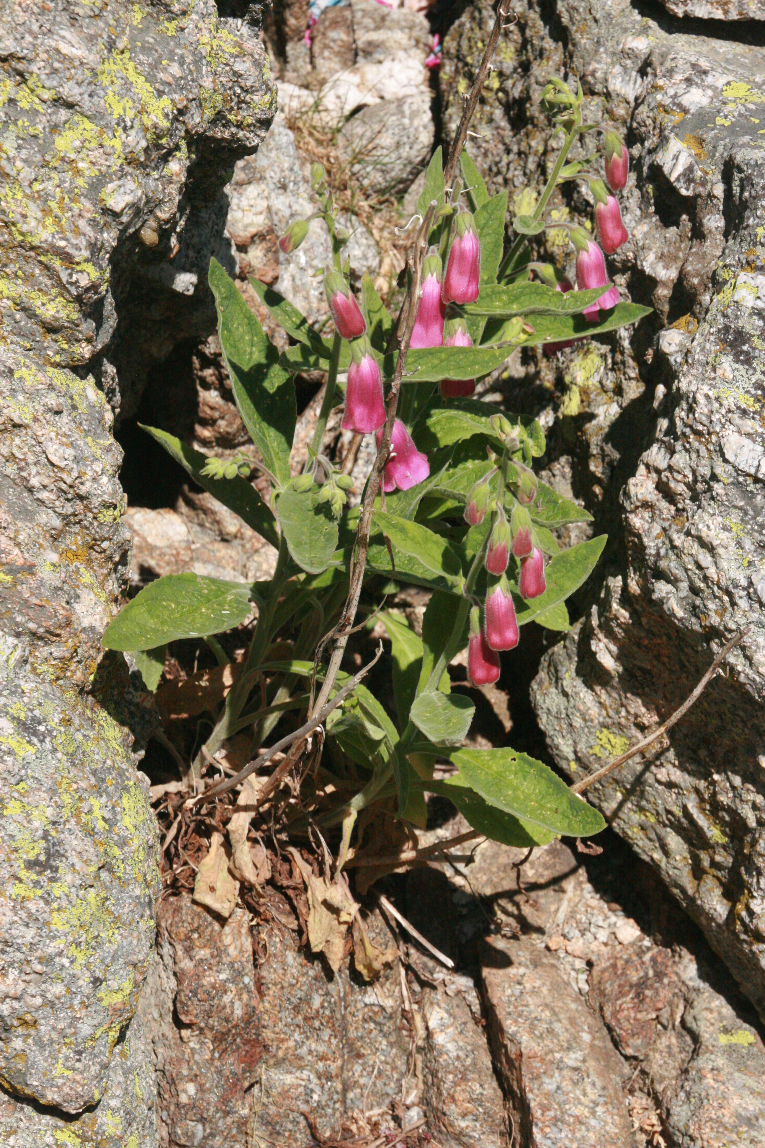 Flora (gen. Digitalis) en las inmediaciones de la Laguna Grande del Circo de Gredos en la Sierra de Gredos. España